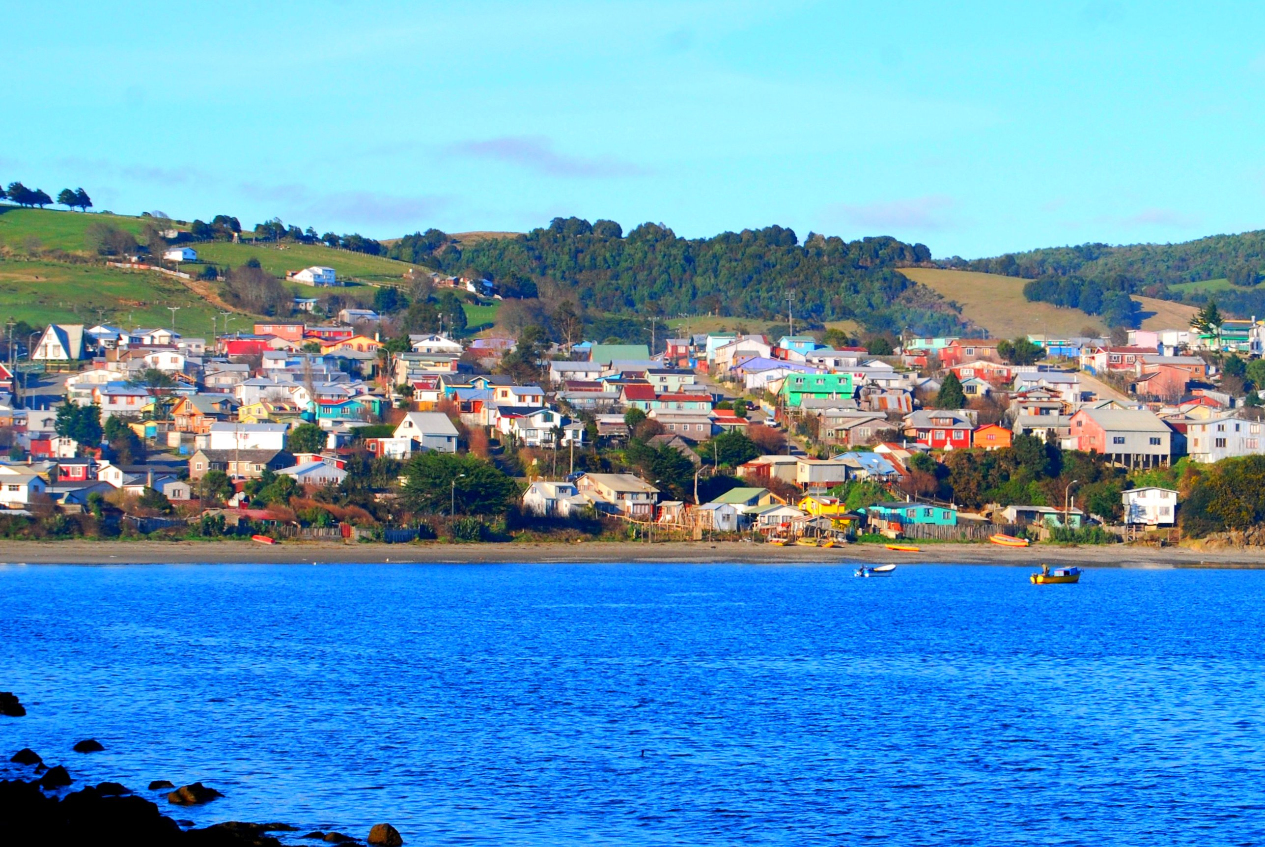 Vista de la ciudad de Ancud, en Chiloé.